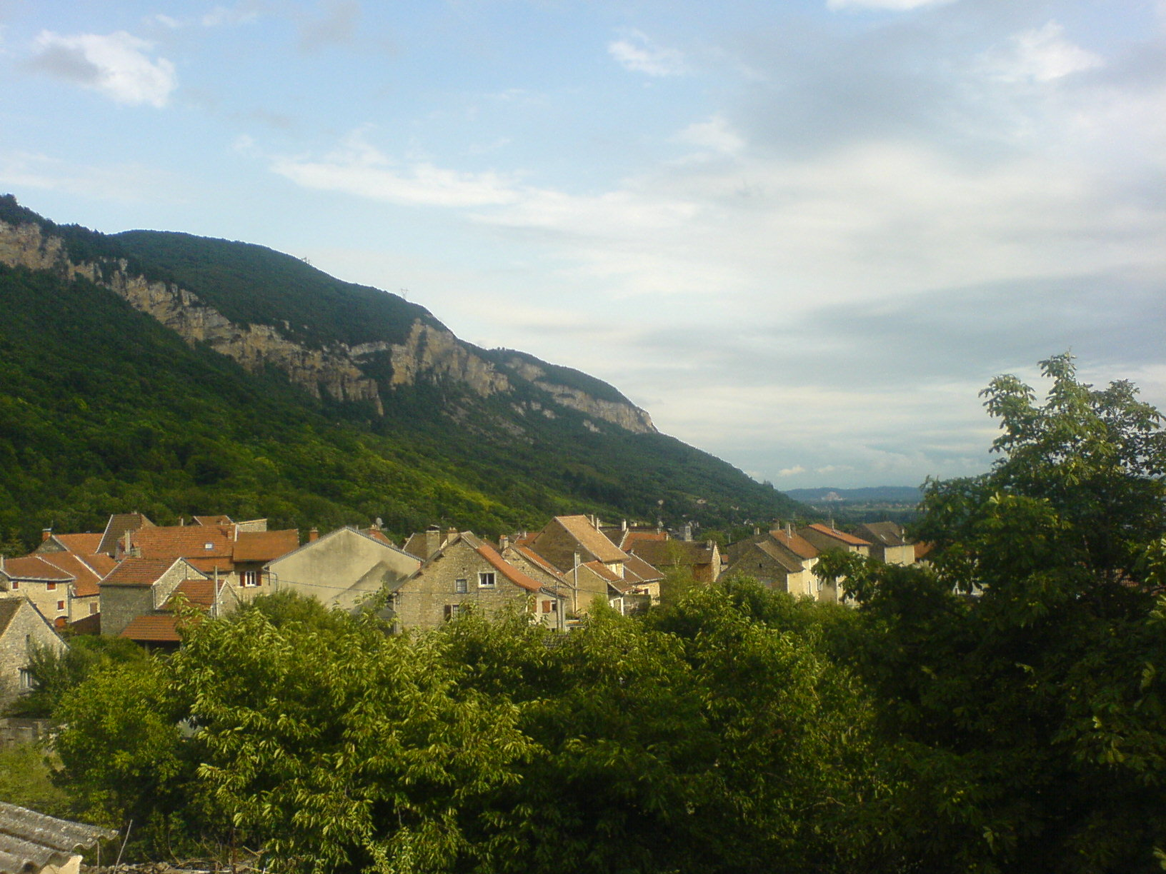 paysage